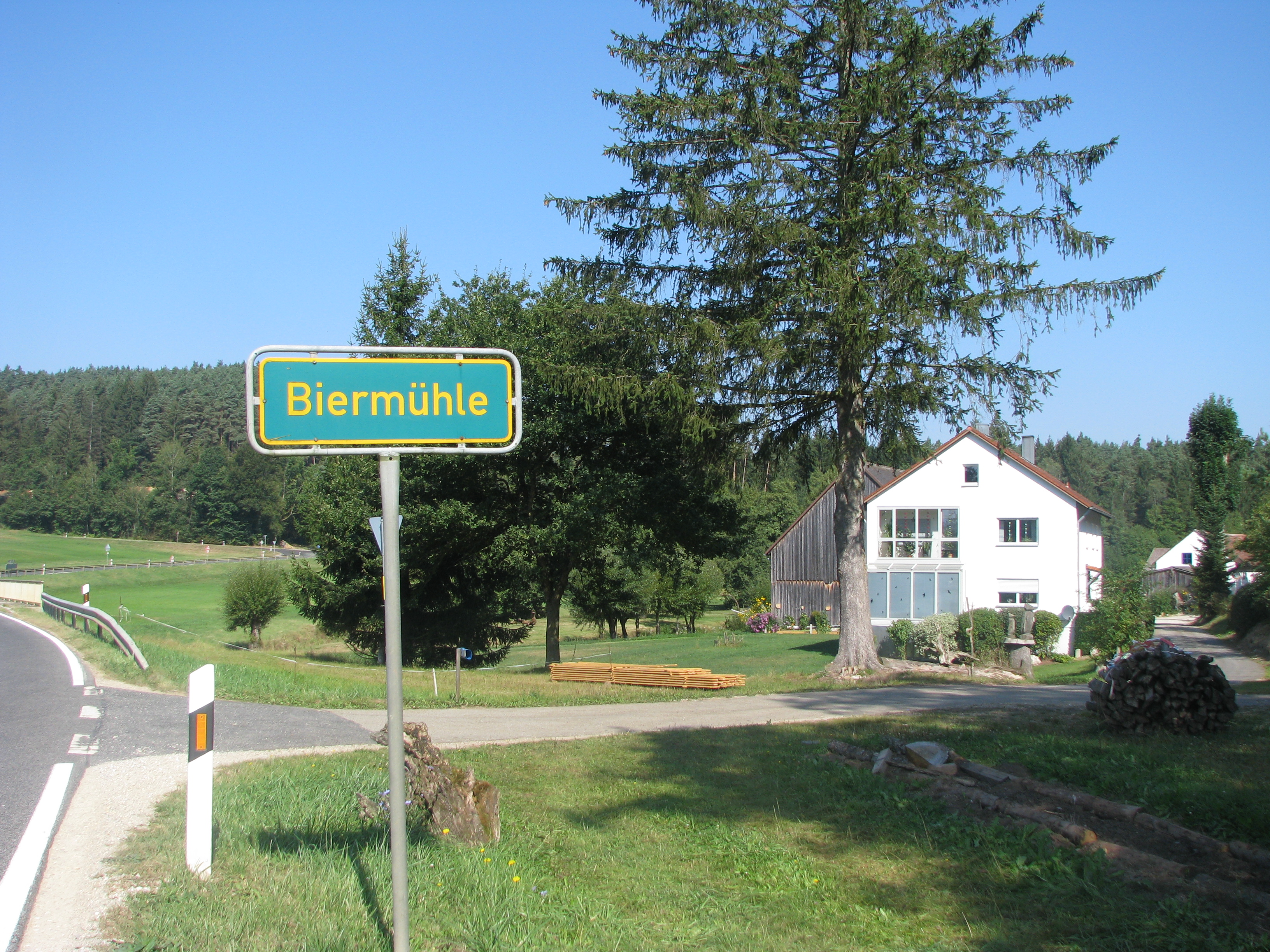 Biermühle, Ortsteil von Berching im bayerischen Landkreis Neumarkt in der Oberpfalz